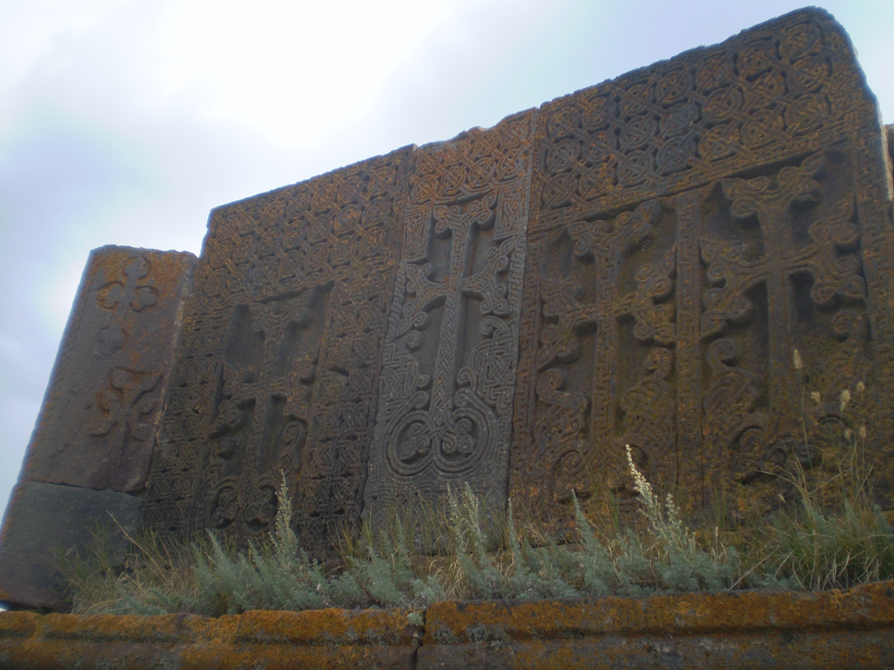 Kachkars, Noraduz